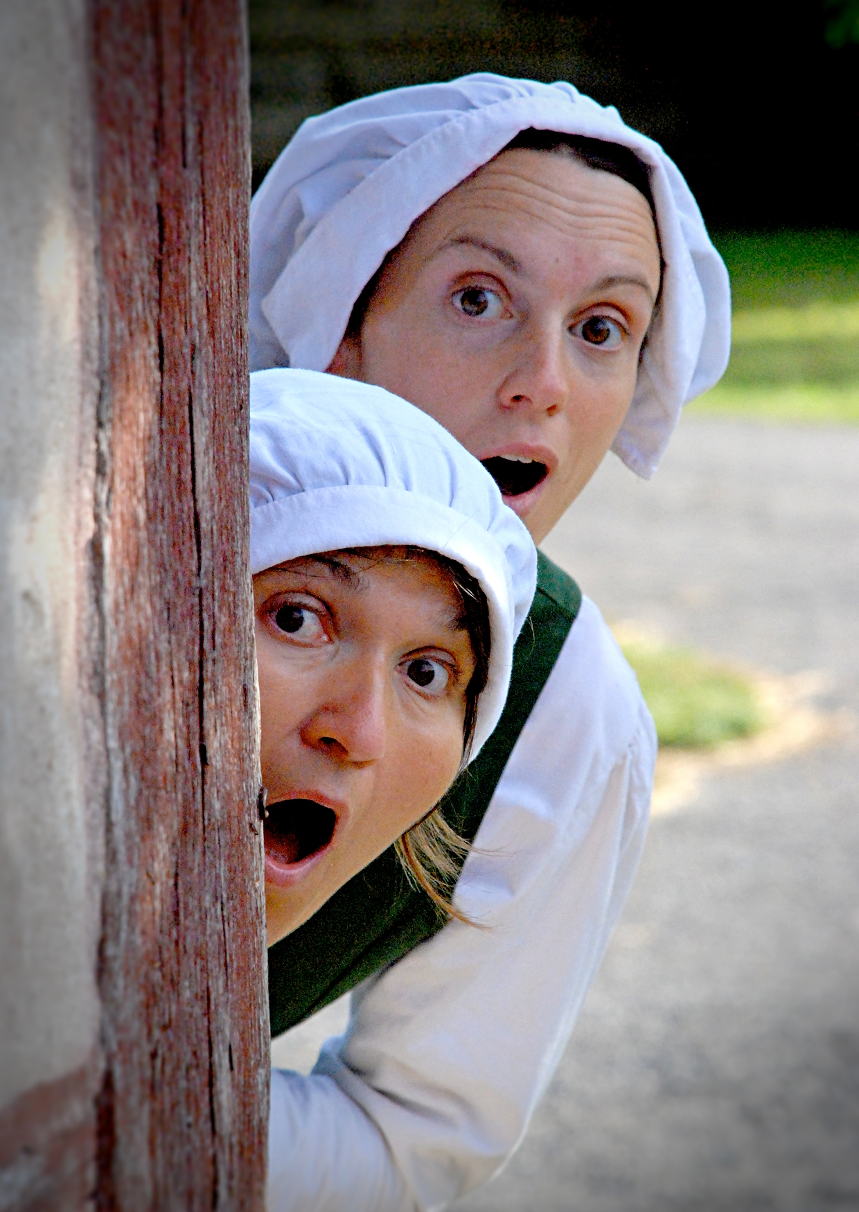 Freilandtheater Käthe und Helene